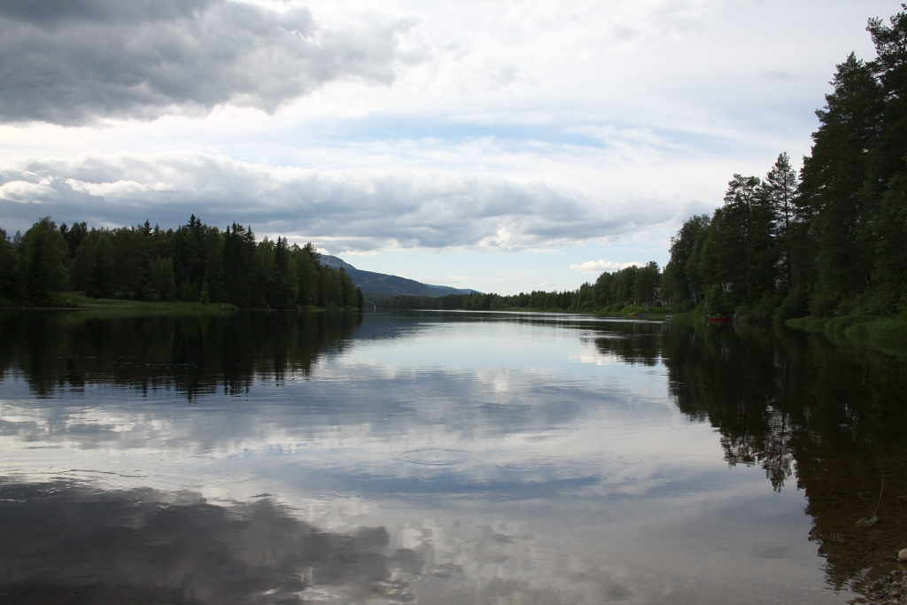 Trysilelva in Nybergsund